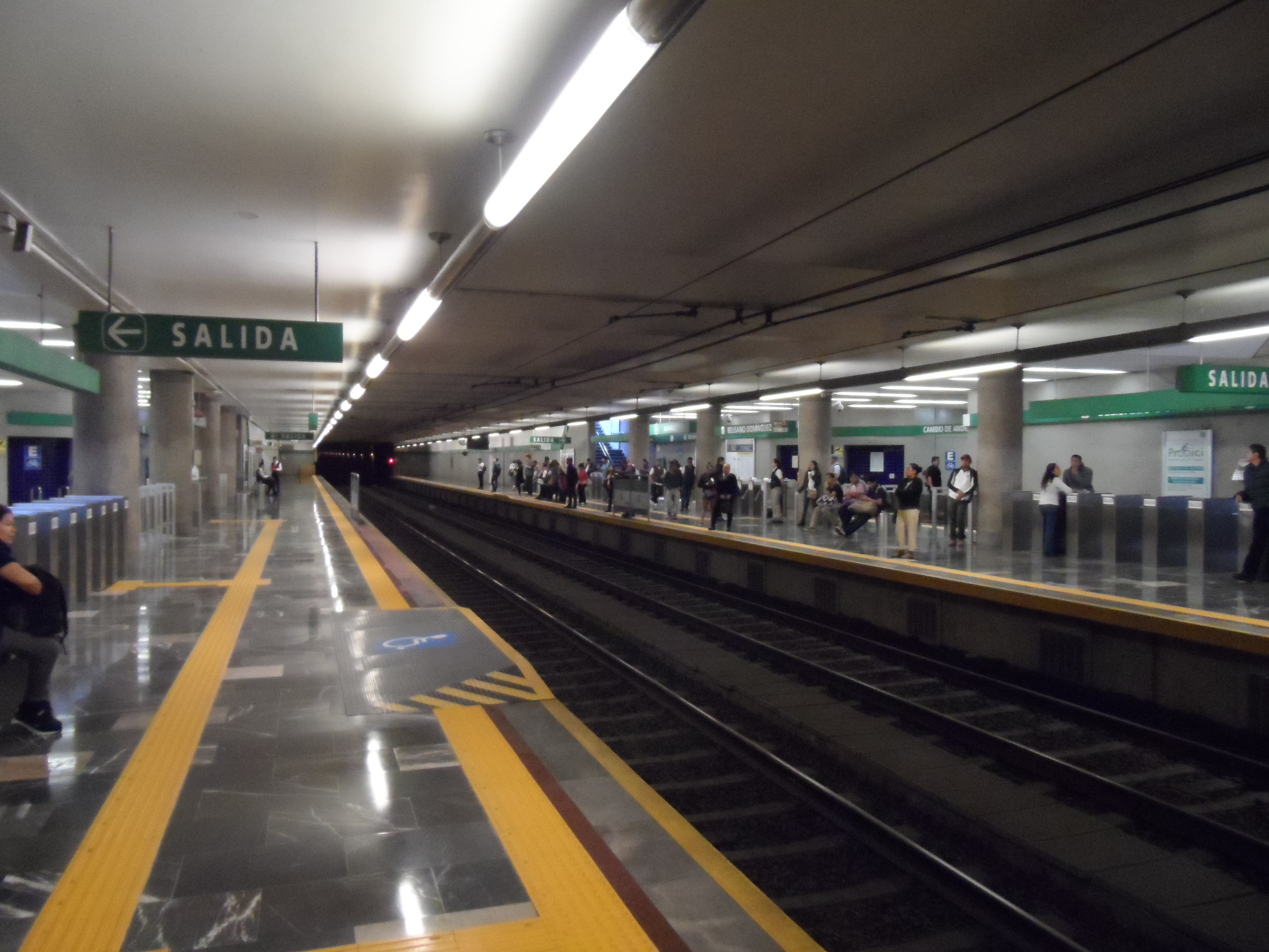 La estación "Belisario Domínguez" de la Línea 2 del Tren Ligero de Guadalajara.